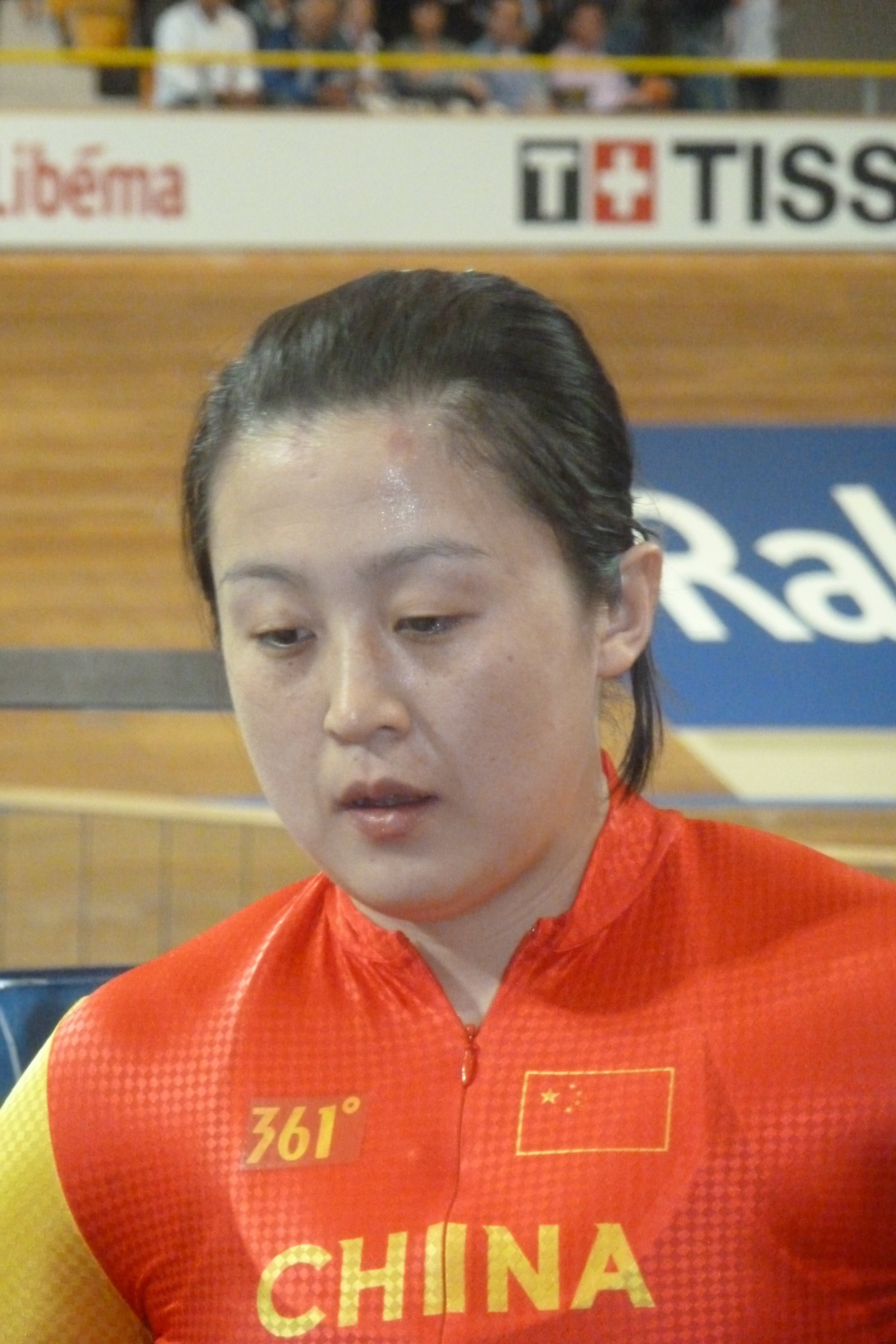 Guo Shuang, chin. Radrennfahrerin